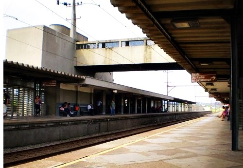 Plataforma da estação Capuava, em Mauá. Linha 10 da CPTM.